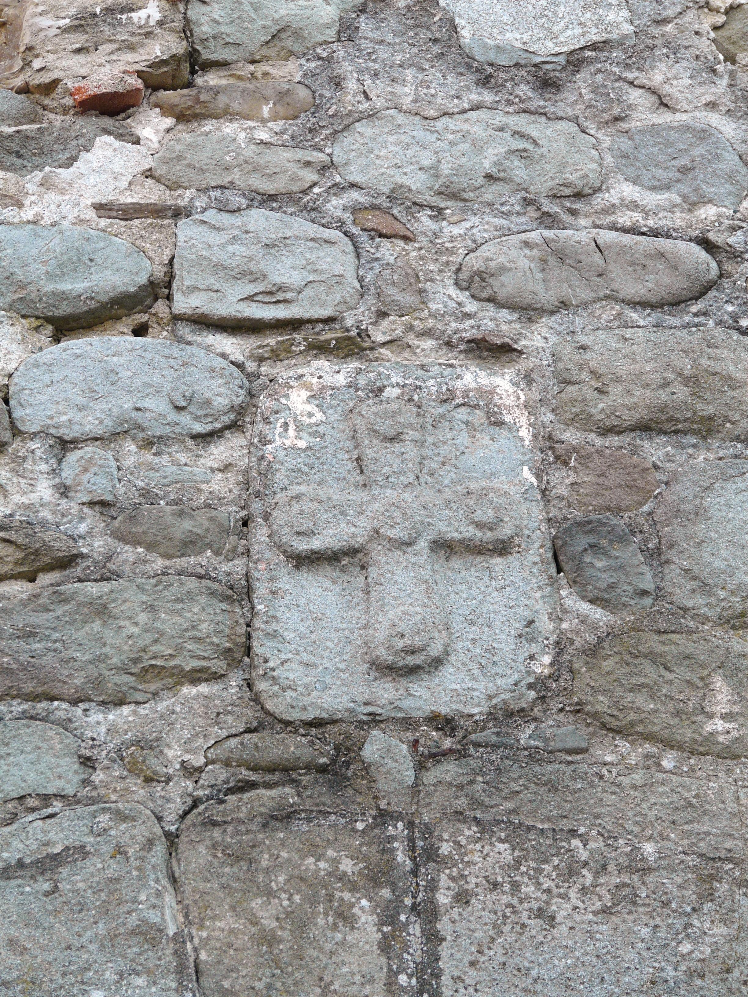 Abbazia dell'Accola, Borghetto di Vara, Liguria, Italia